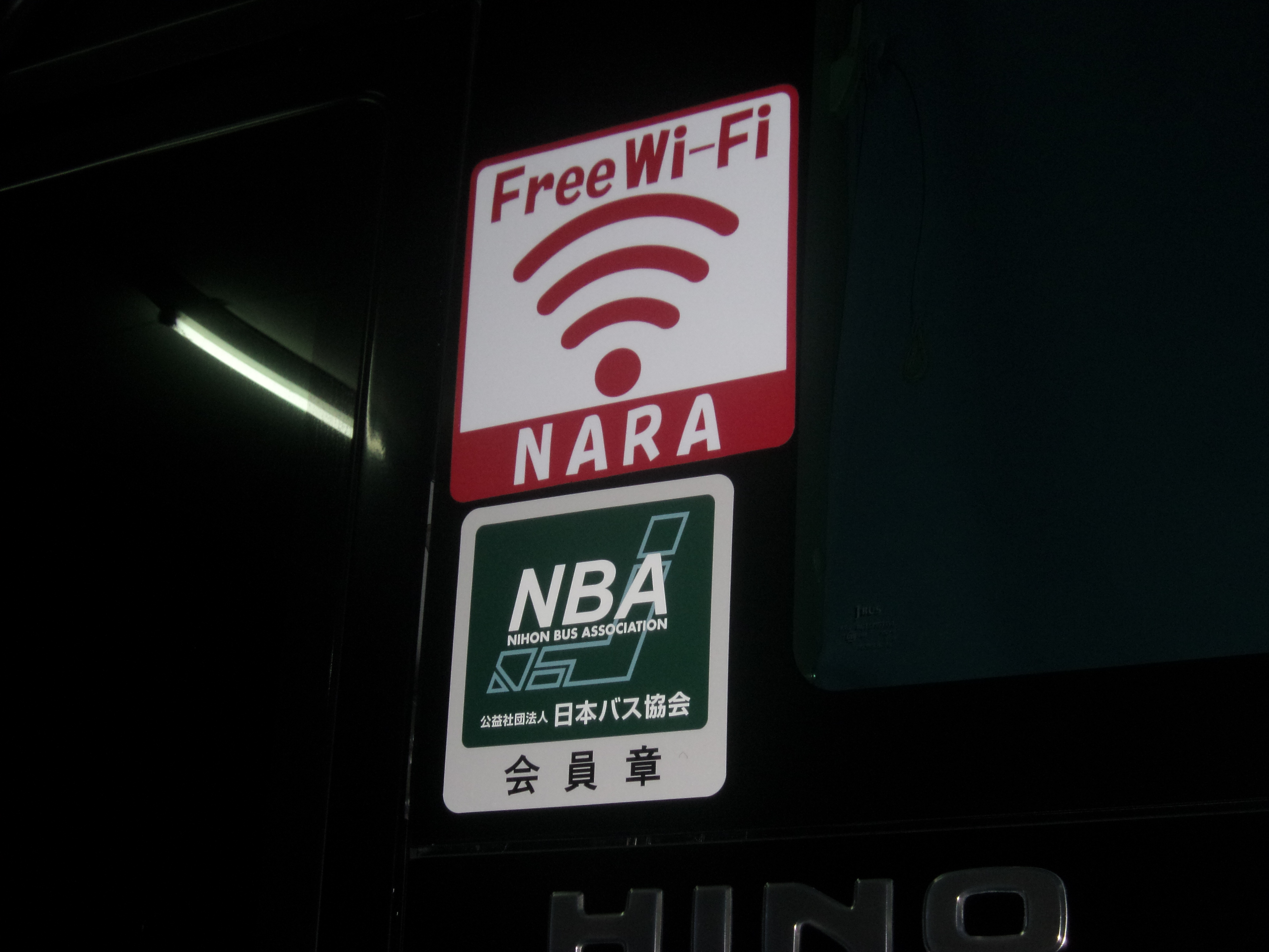 奈良交通の高速バスやまと号のwi-fi対応ステッカー